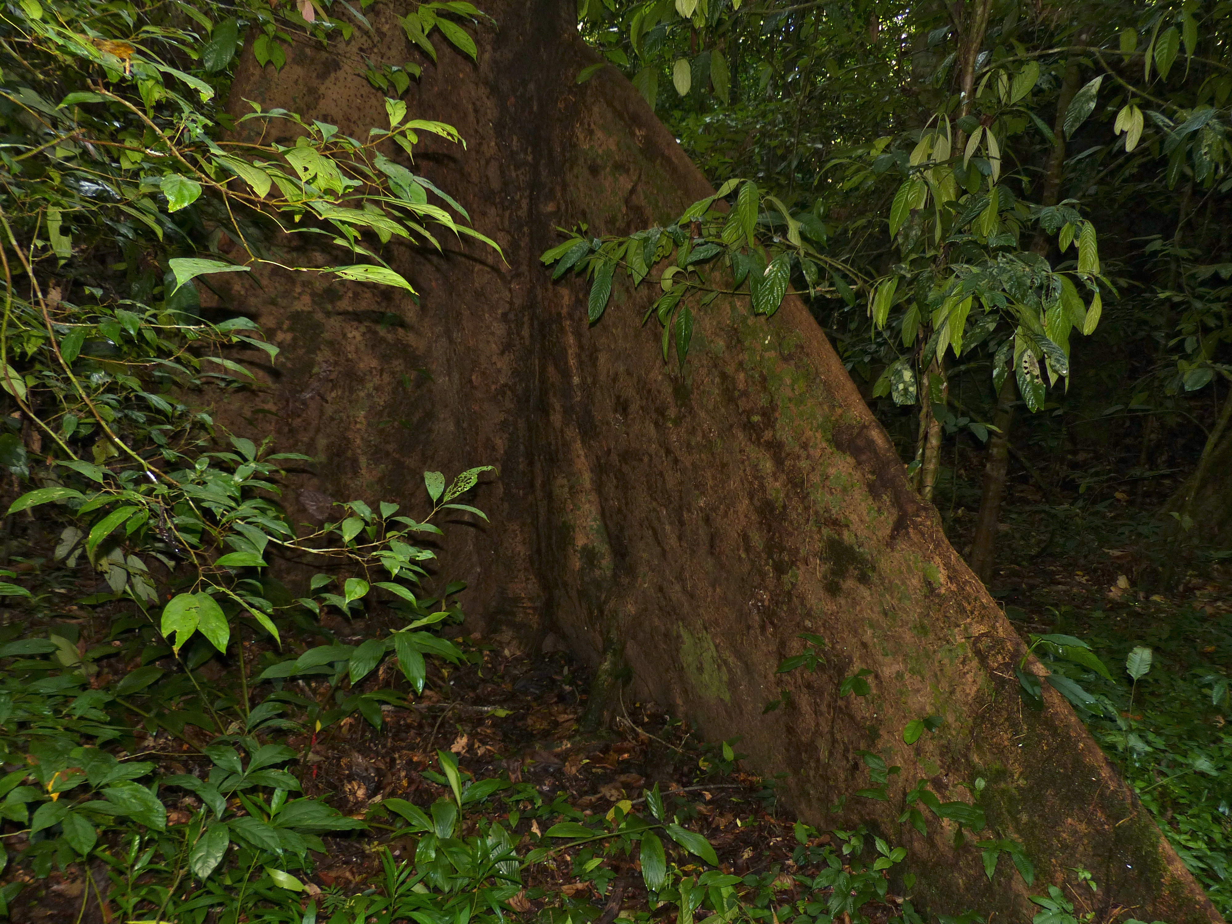 Niah NP, Sarawak, MALAYSIA